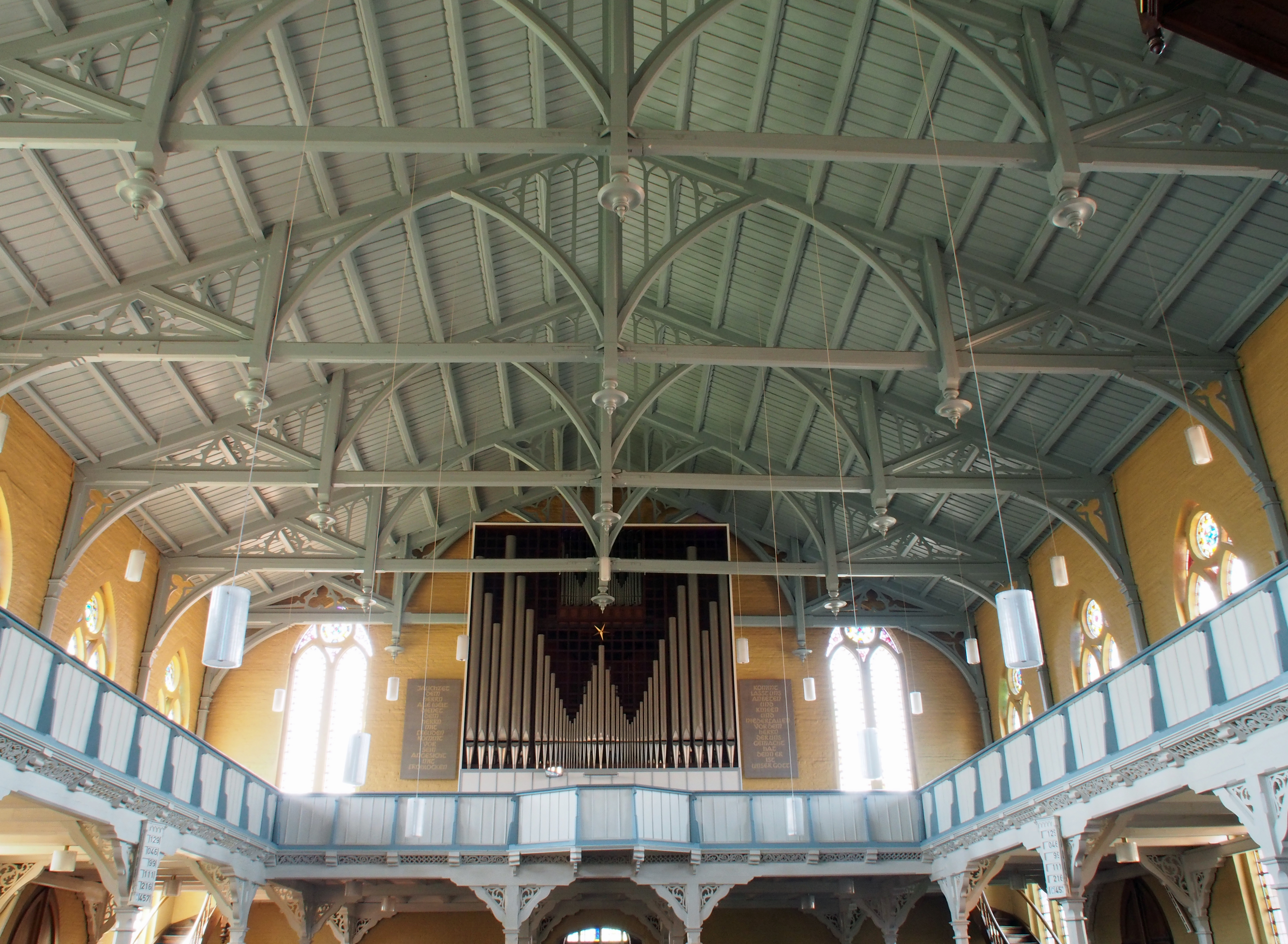 Inneres mit Deckengewölbe und Orgel der Großen Kreuzkirche in Hermannsburg, Niedersachsen, Germany